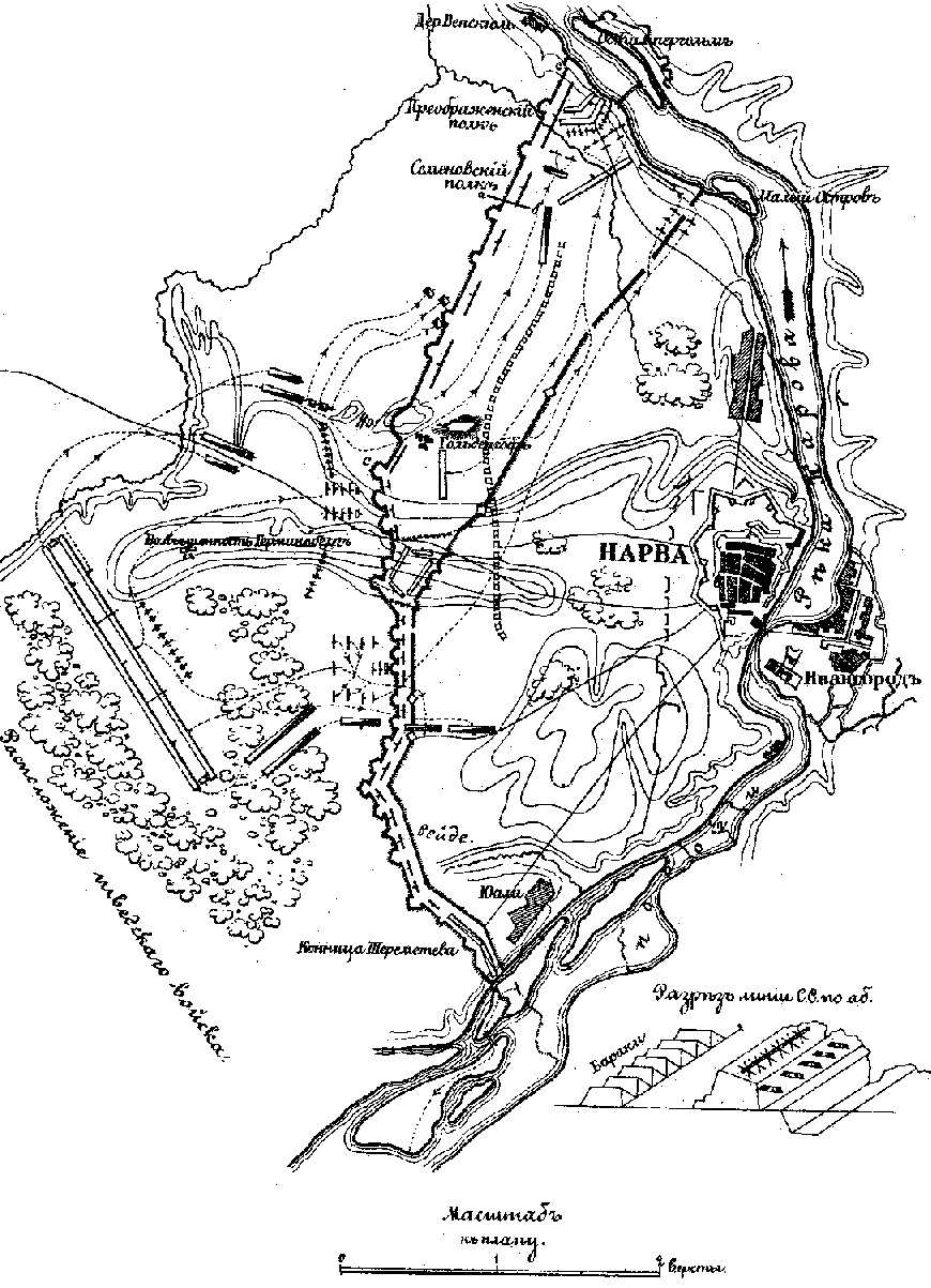 План сражения под Нарвой 1700 годаИз книги Петров А. В. Город Нарва. Его прошлое и достопримечательности в связи с историей упрочения русскаго господства на Балтийском побережье. СПб., 1901.